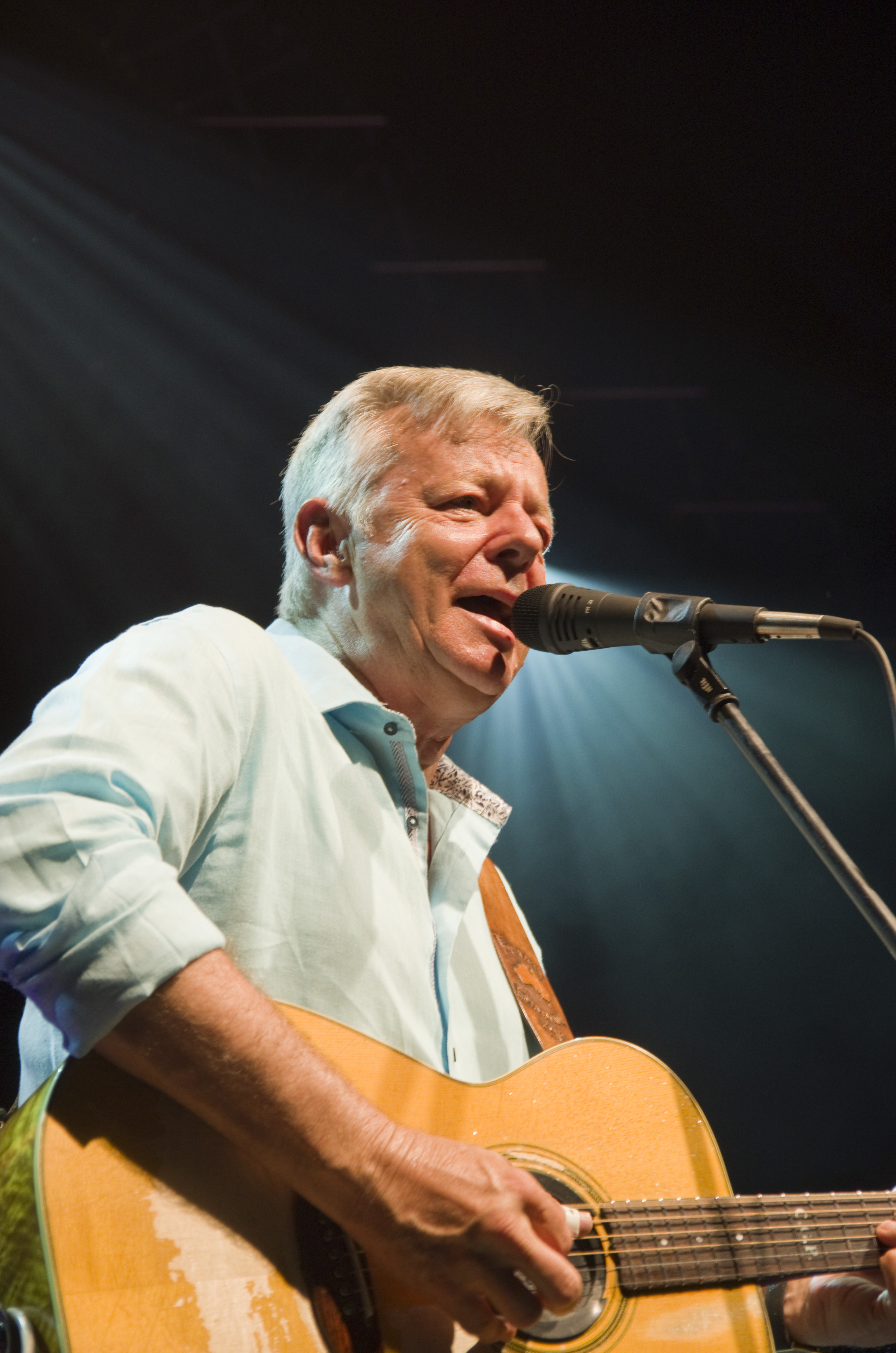 Das Zelt-Musik-Festival 2015 in Freiburg im Breisgau. 05.07.2015 Tommy Emmanuel